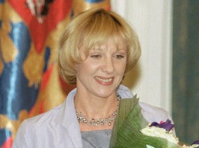 Елена Яковлева в Екатерининском зале Кремля